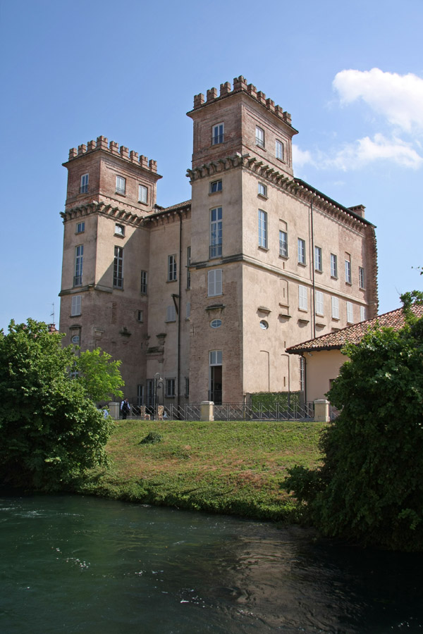 Palazzo Archinto o Castello di Robecco sul Naviglio (MI)